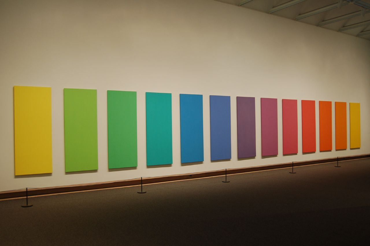 Spectrum V